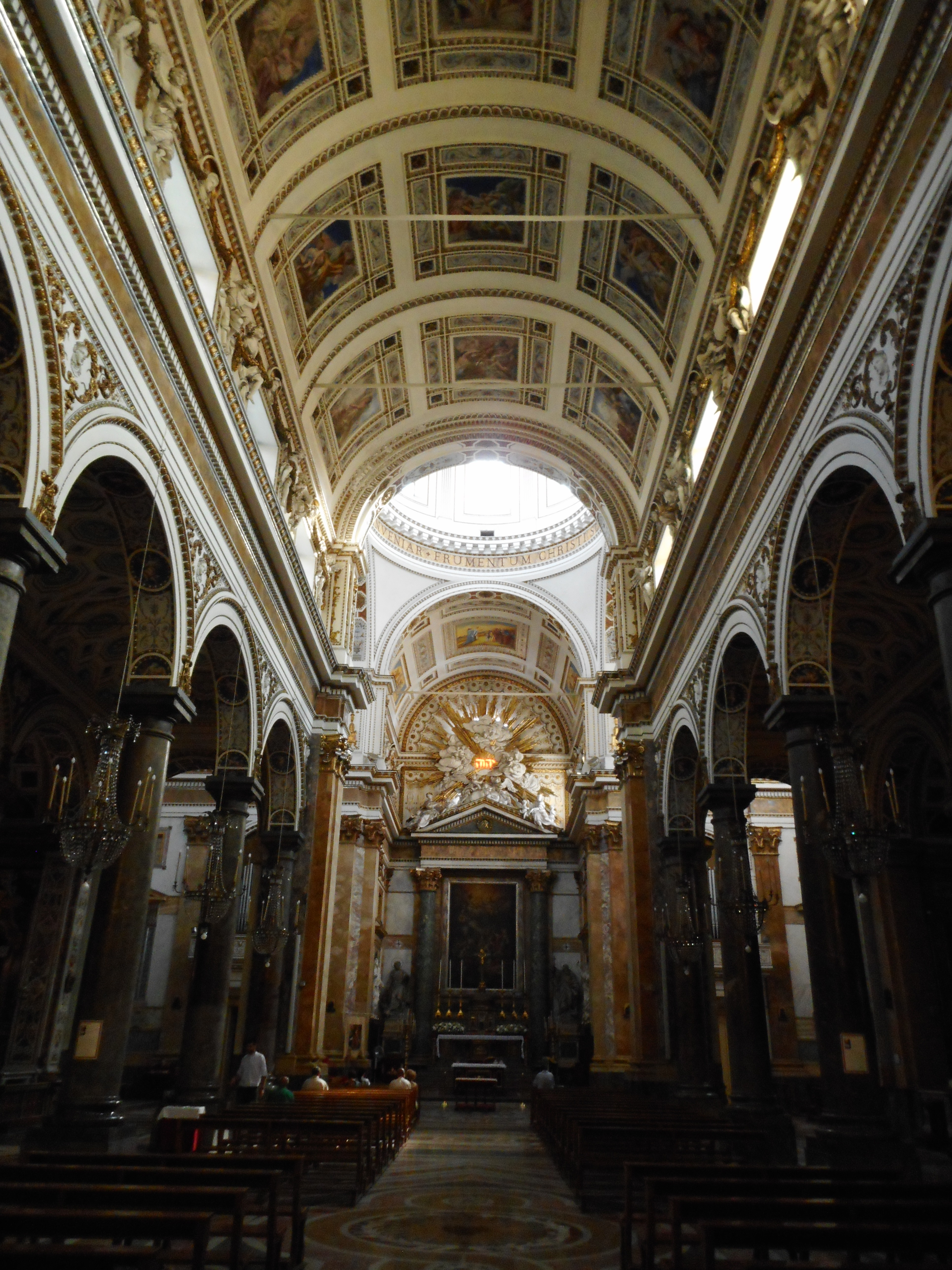 Interno della chiesa di Sant'Ignazio all'Olivella